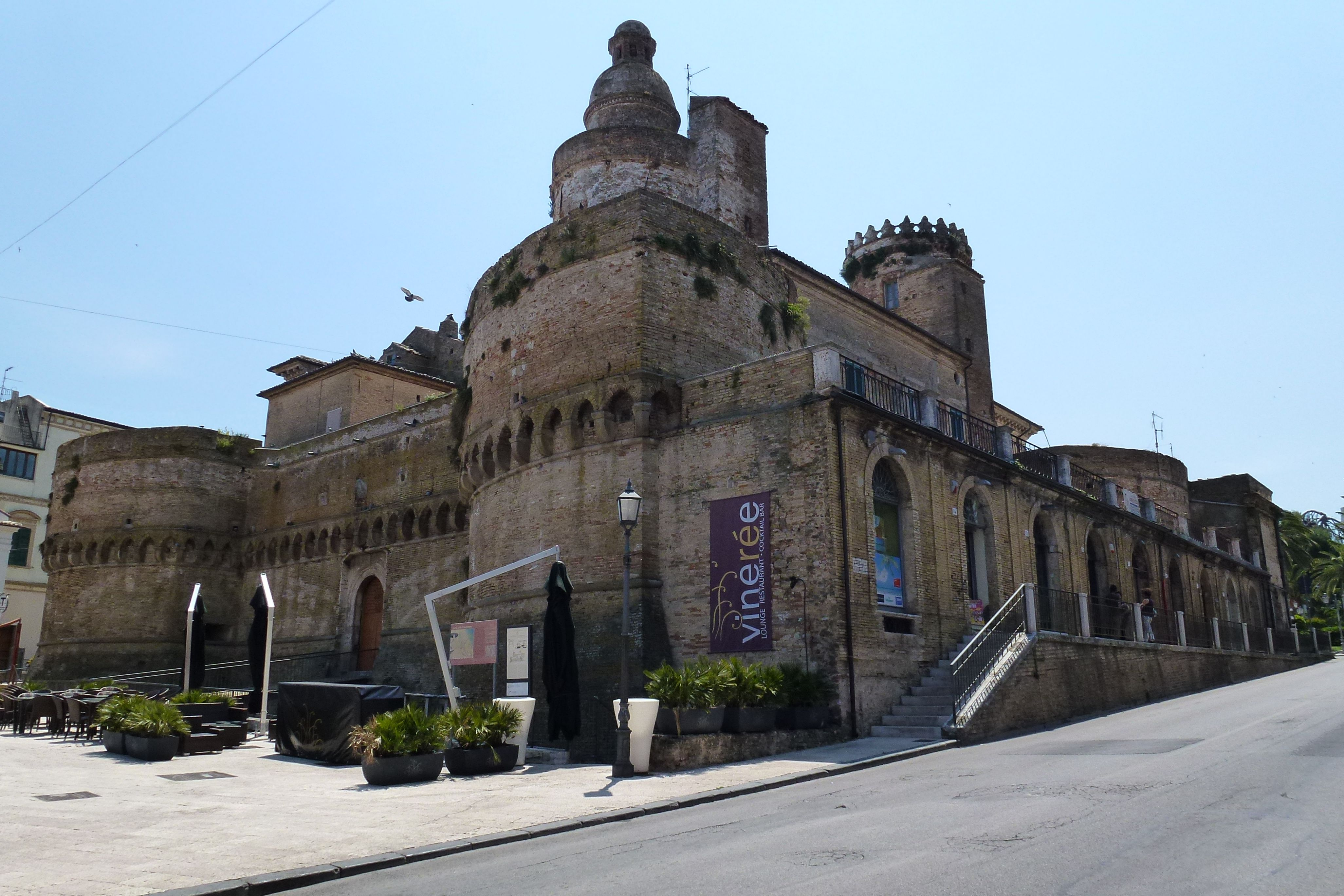 Vasto